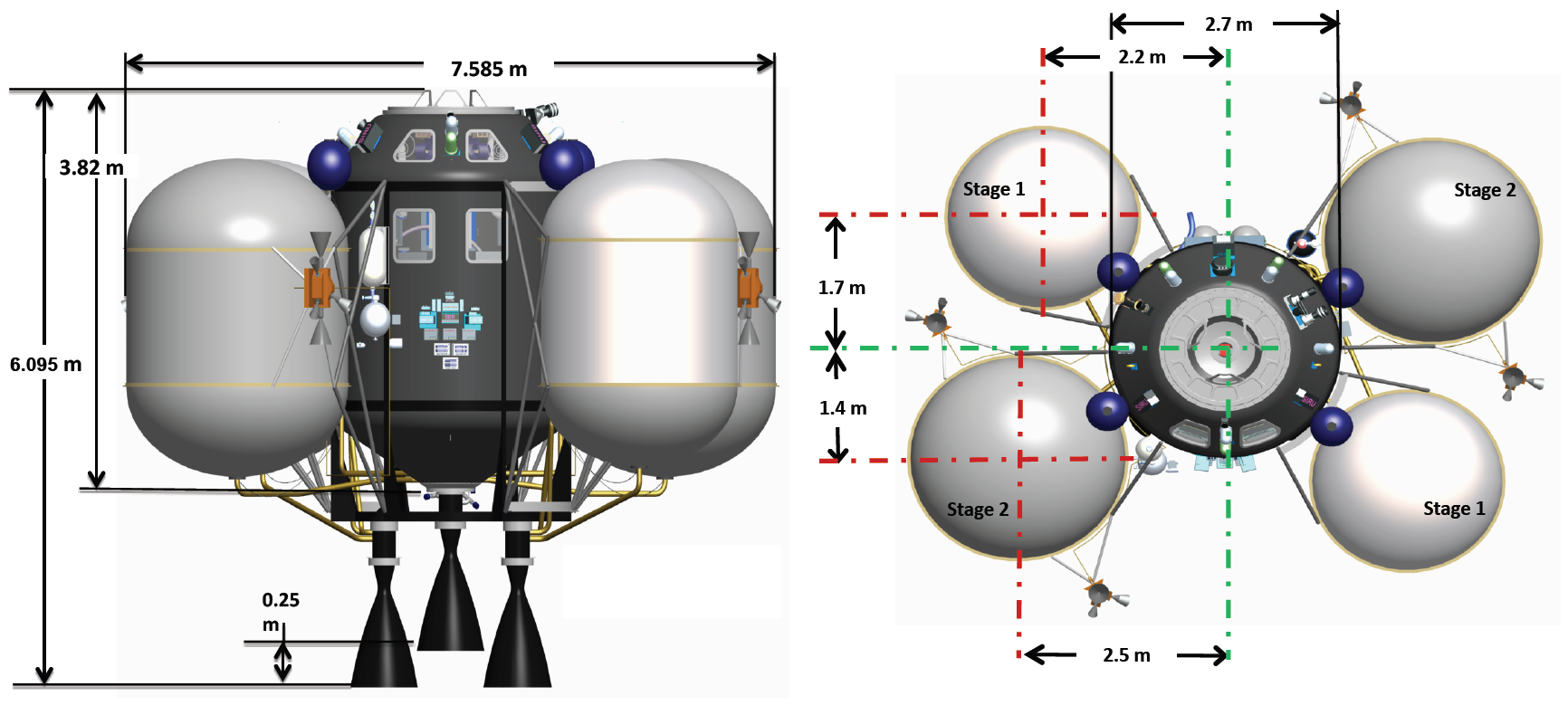 Human Exploration of Mars 6-crew-habitable-MAV source : NASA Design Reference Architecture 5.0 Annexe 2 (2014)